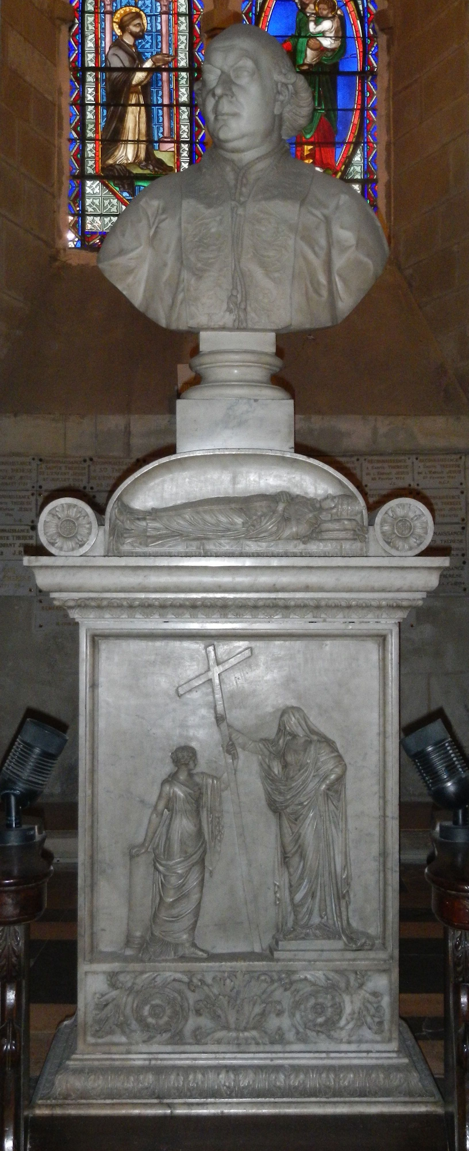 Büste des Papstes Pius VI in der Kathedrale von Valence, Vorderseite.